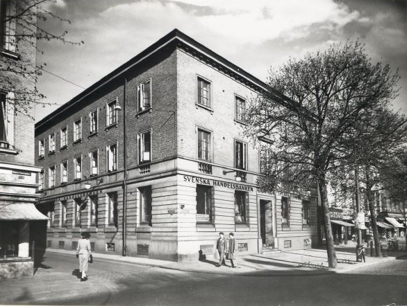 Svenska handelsbanken på Östra Hamngatan 27 / Drottninggatan Göteborg. Byggår 1928. Arkitekter Vilhelm Mattson och Sven Steen